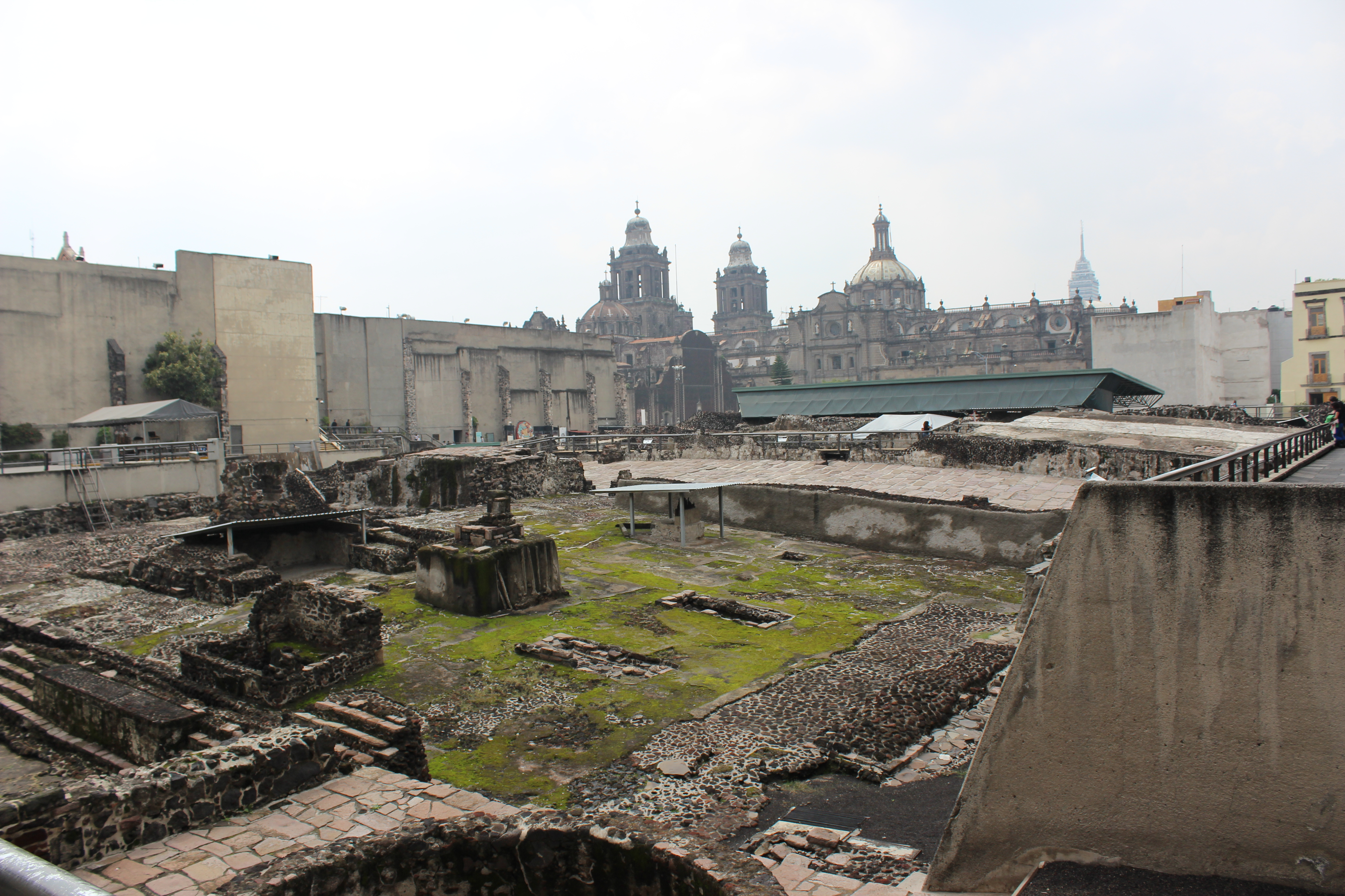 Templo Mayor